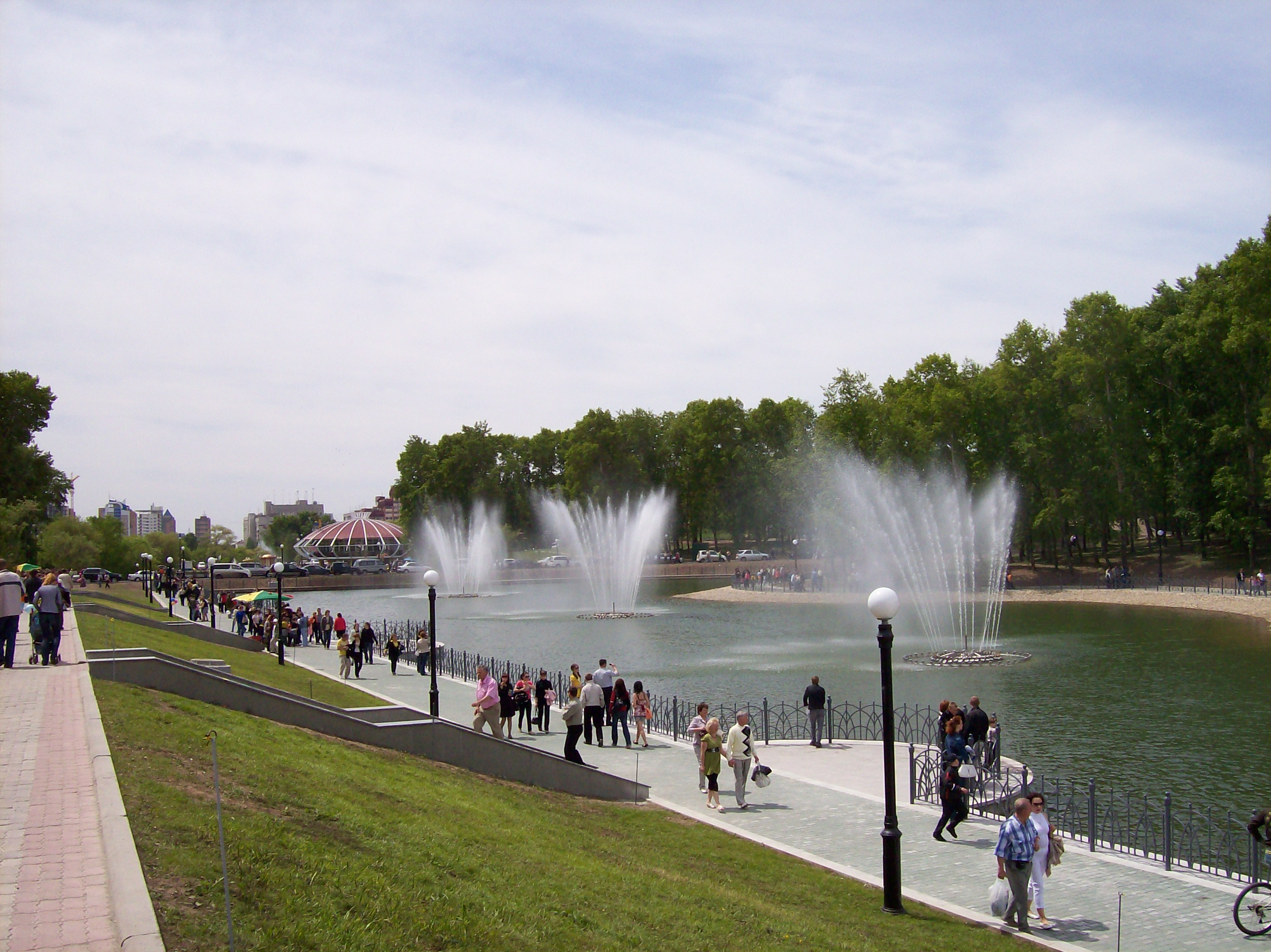 Хабаровские городские пруды